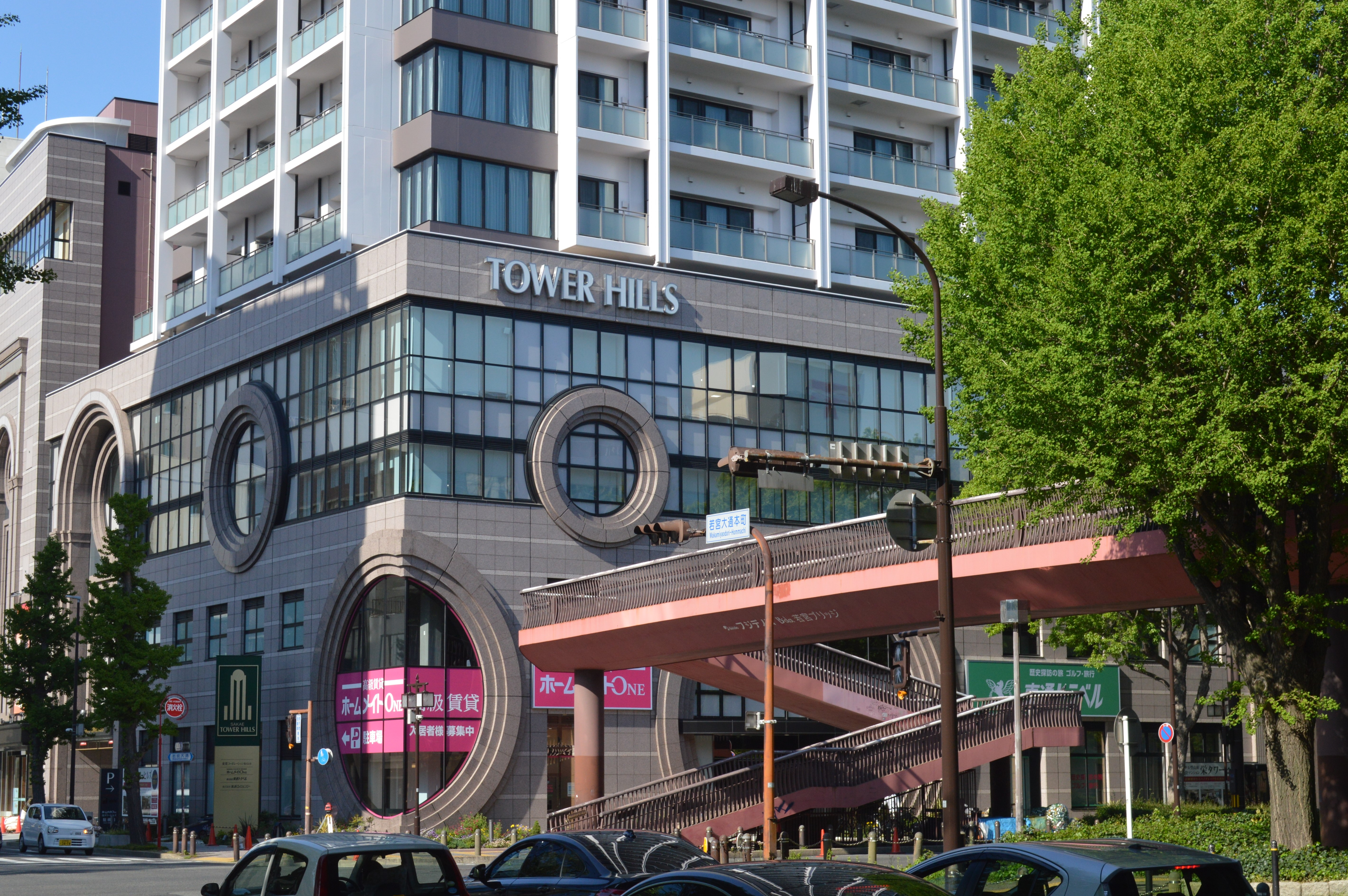 愛知県名古屋市中区栄三丁目にある栄タワーヒルズ。